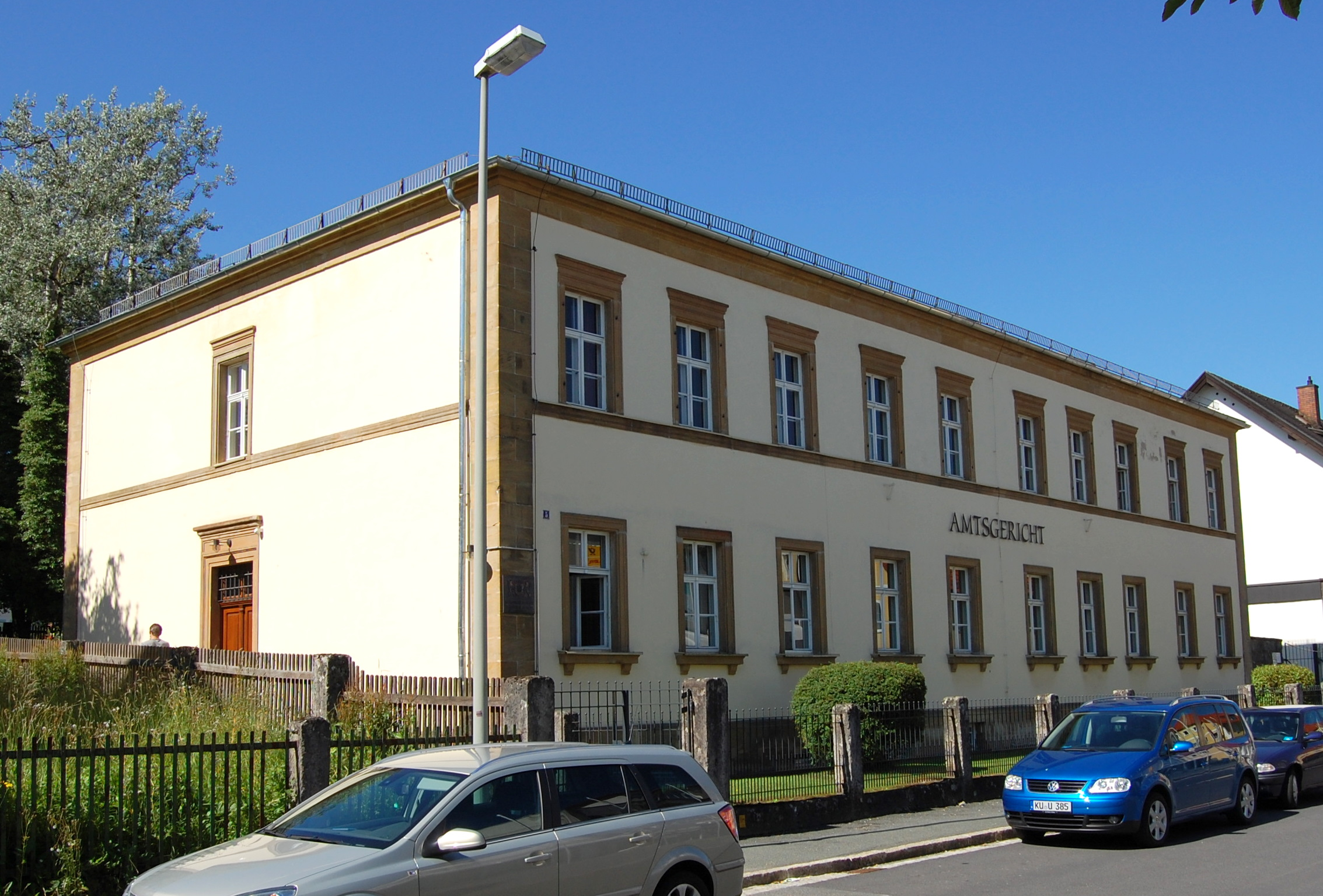 Amtsgerichtsgebäude in Pegnitz